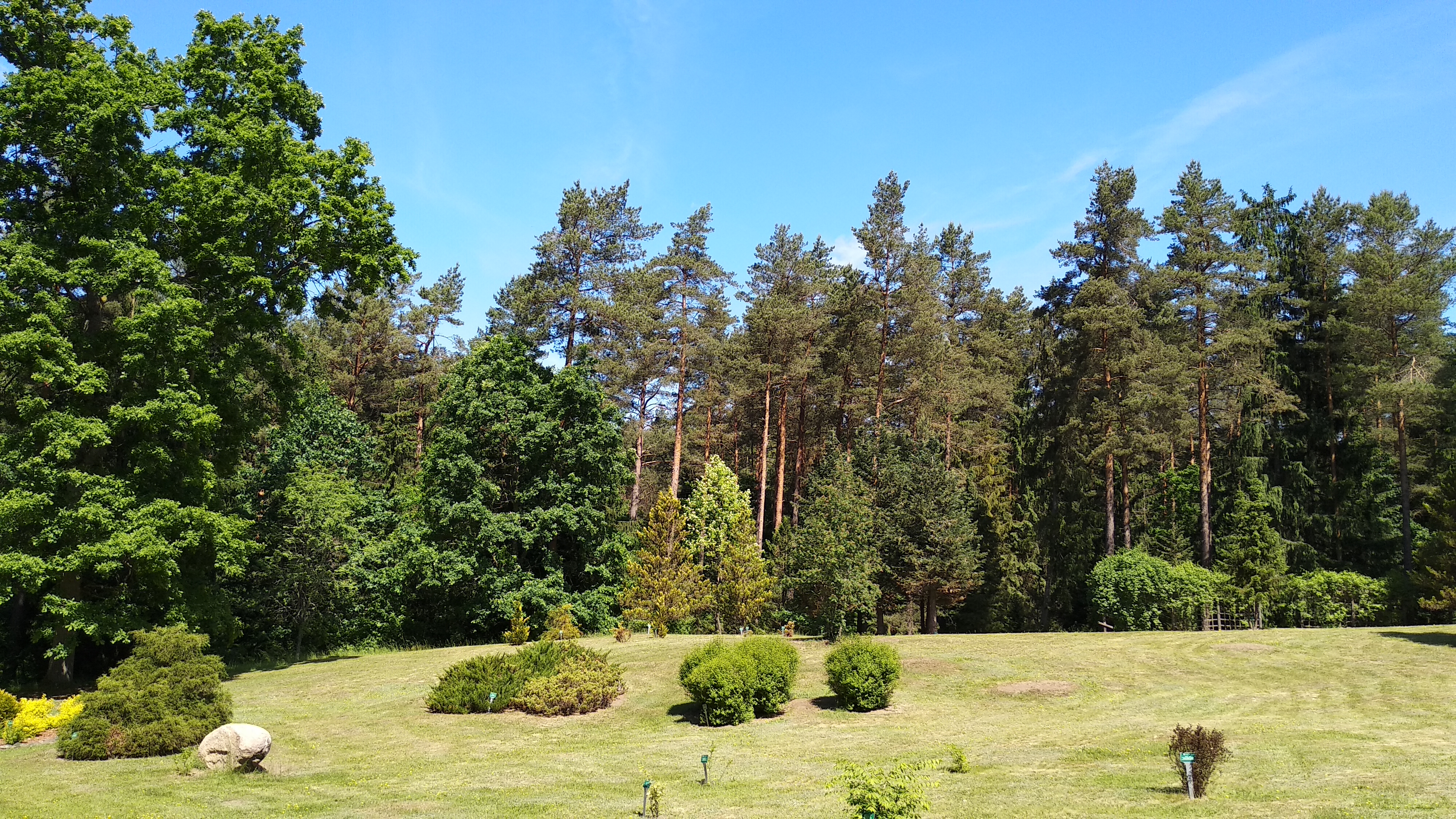 Arboretum w Kopnej Górze.